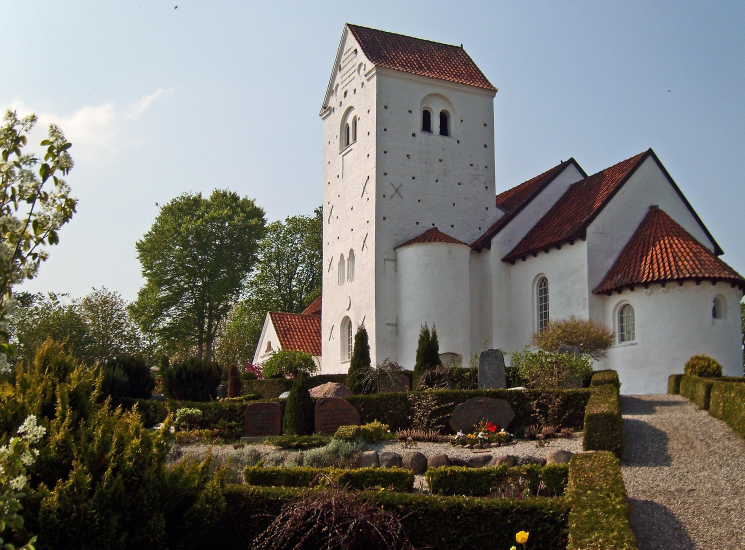 fra sydøst